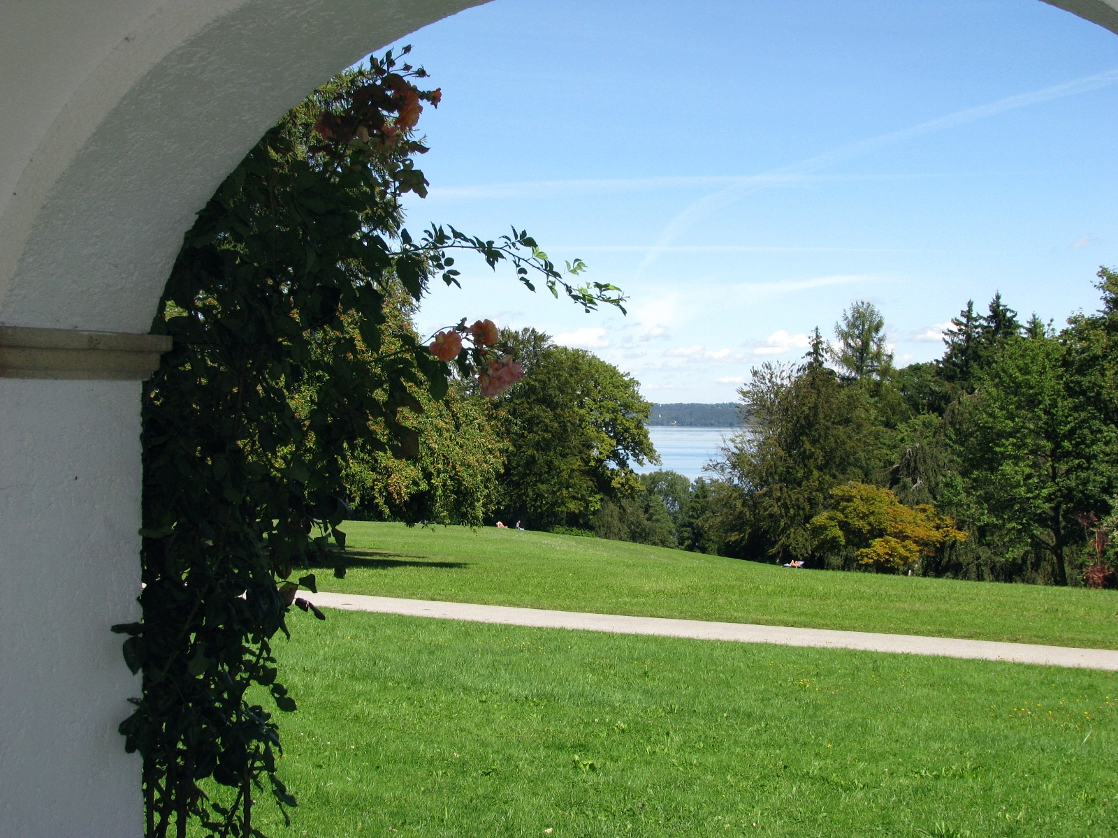 Schloss Höhenried; Aussicht Richtung Starnberger See